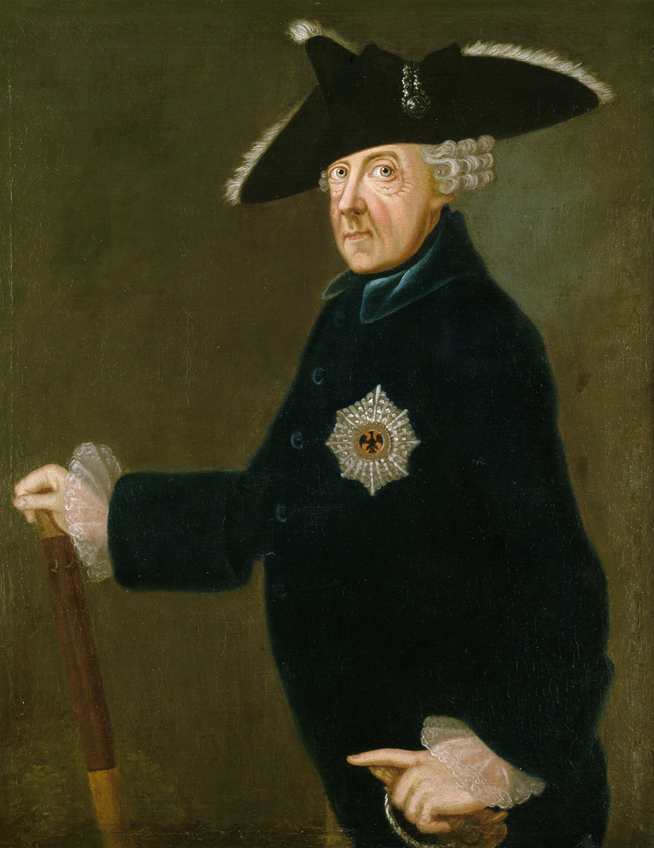 Bildnis Friedrich d. Große mit Dreispitz und Orden des Schwarzen Adlers, vereinfachte Version nach dem Gemälde von Johann Heinrich Christian Franke (1763)